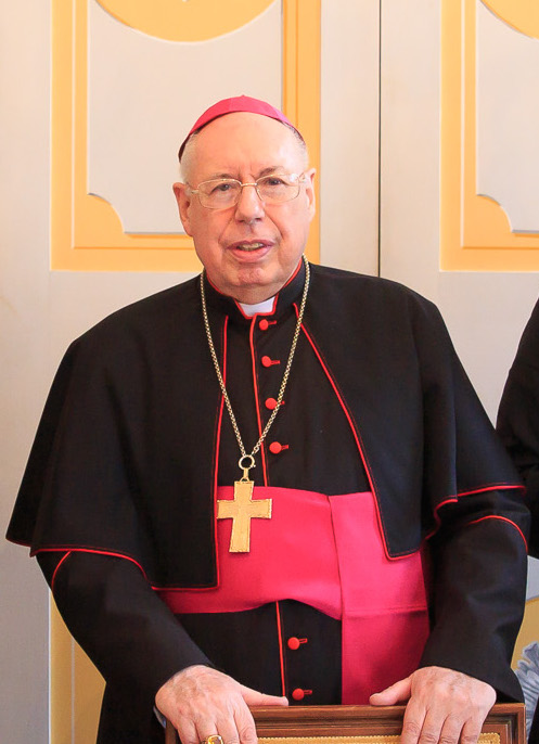 Son Excellenxe Mgr François Bacqué, Nonce Apostolique